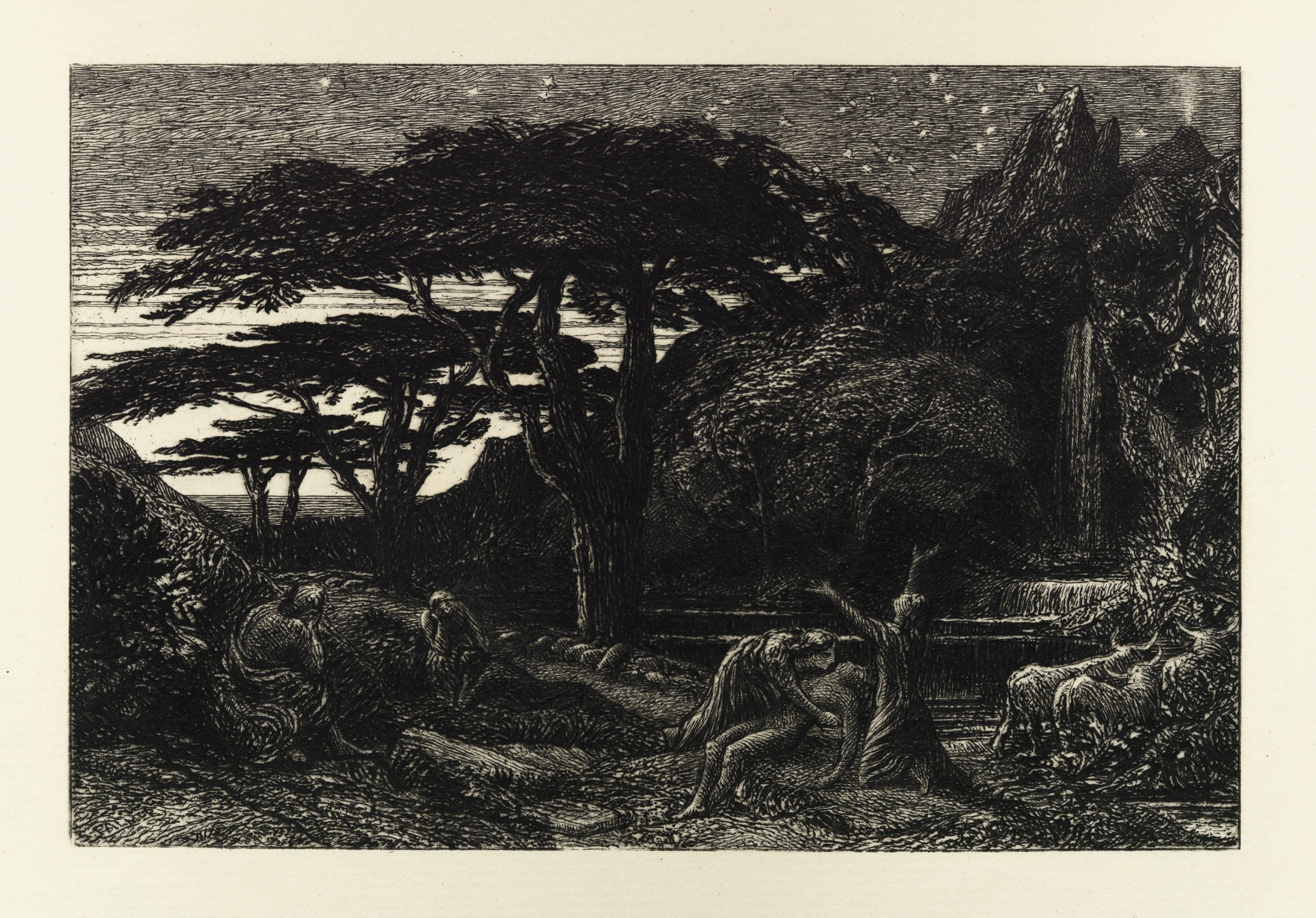 Book; Books